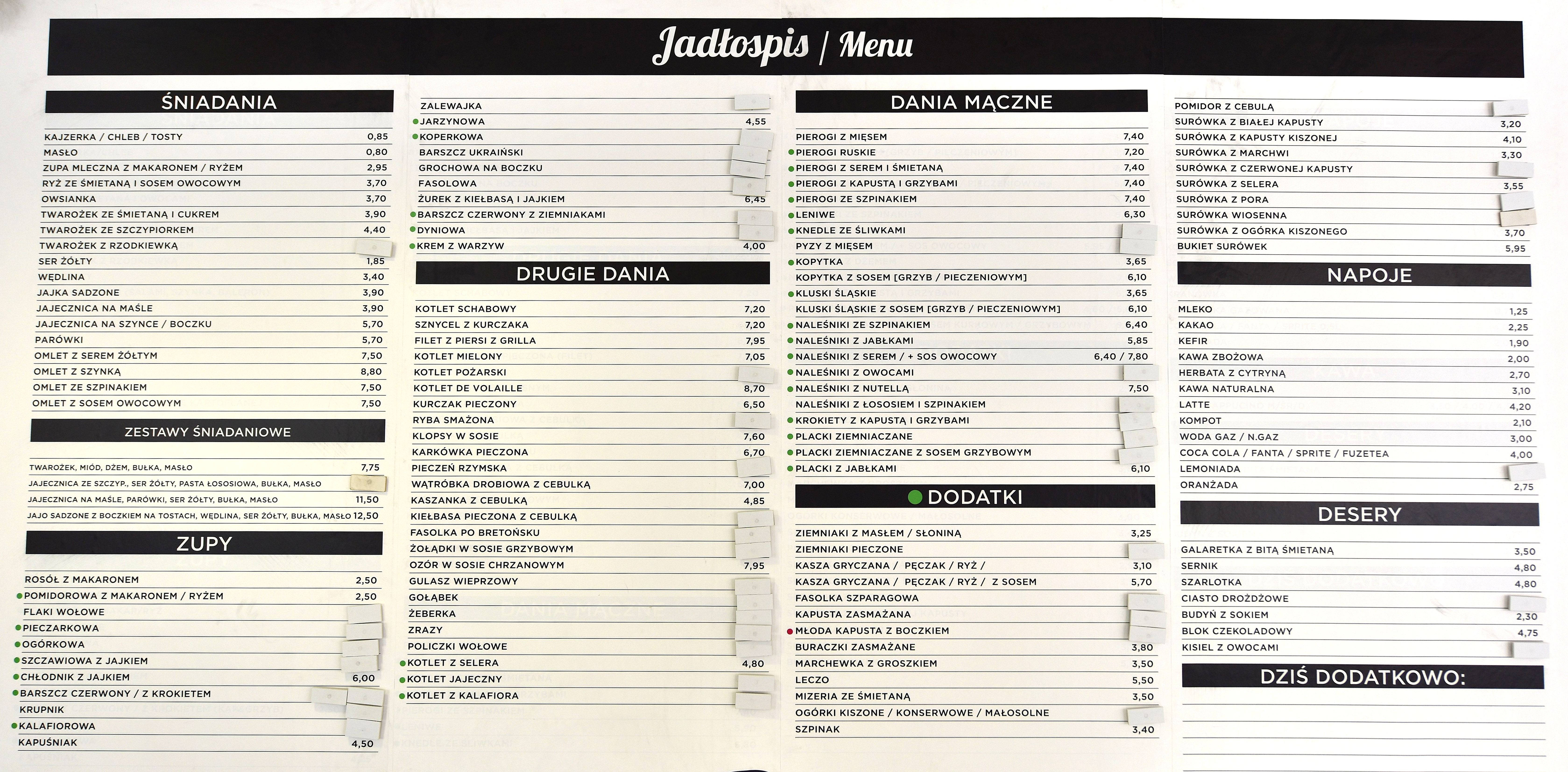 Menu w Mokotowskim Barze Mlecznym przy ul. Puławskiej 63 w Warszawie